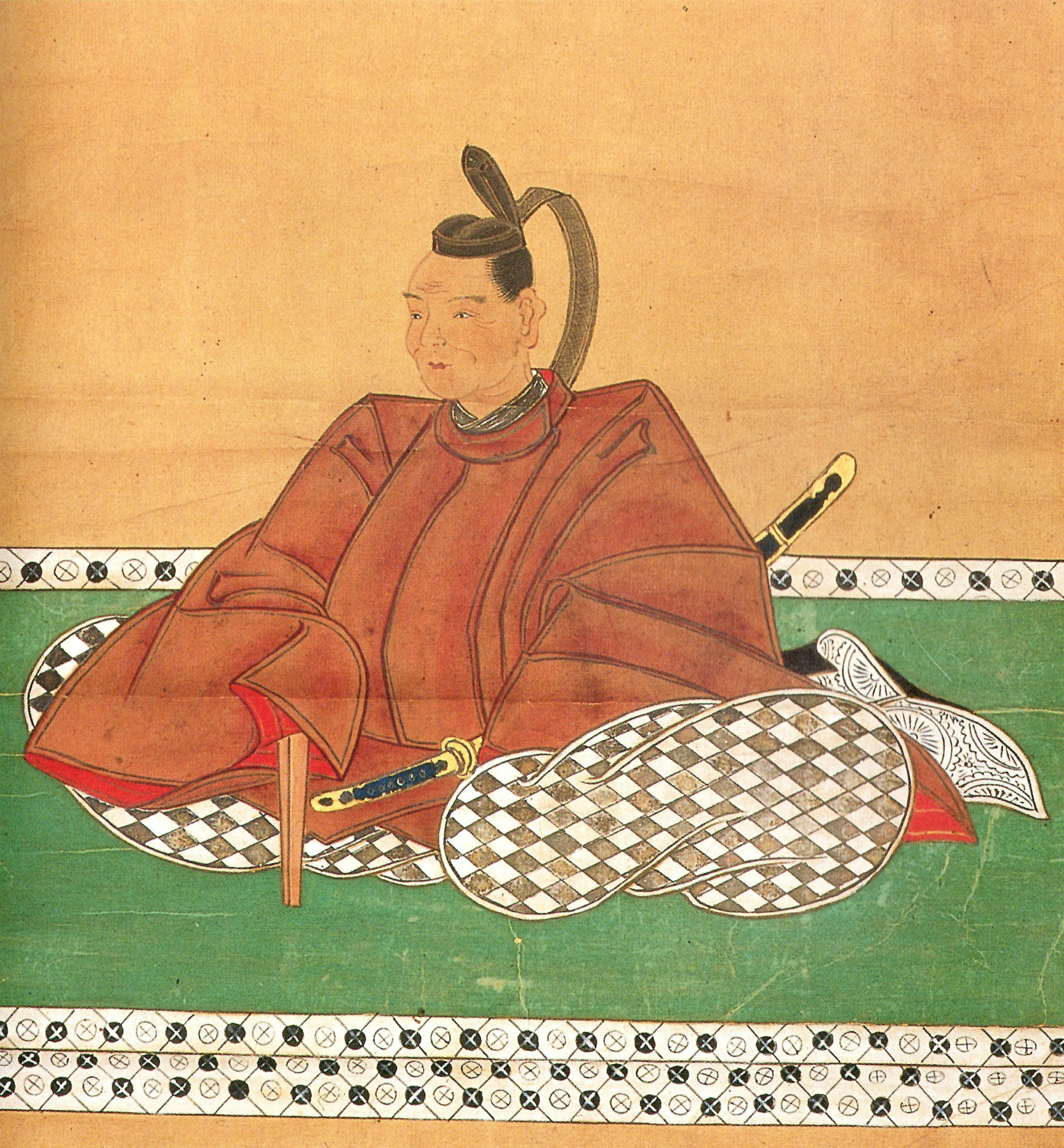 南部重直の肖像。